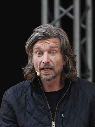 Karl Ove